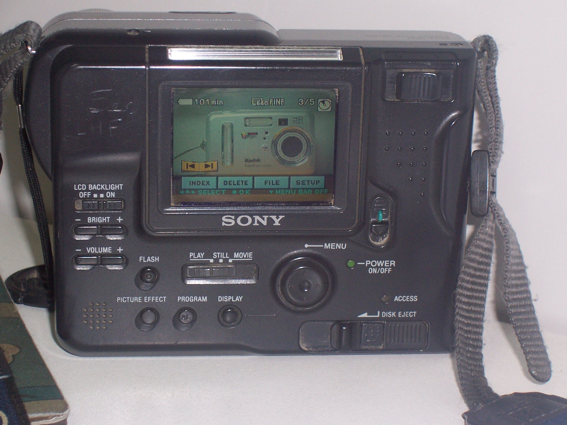 Appareil photographique Sony Mavica MVC-FD88